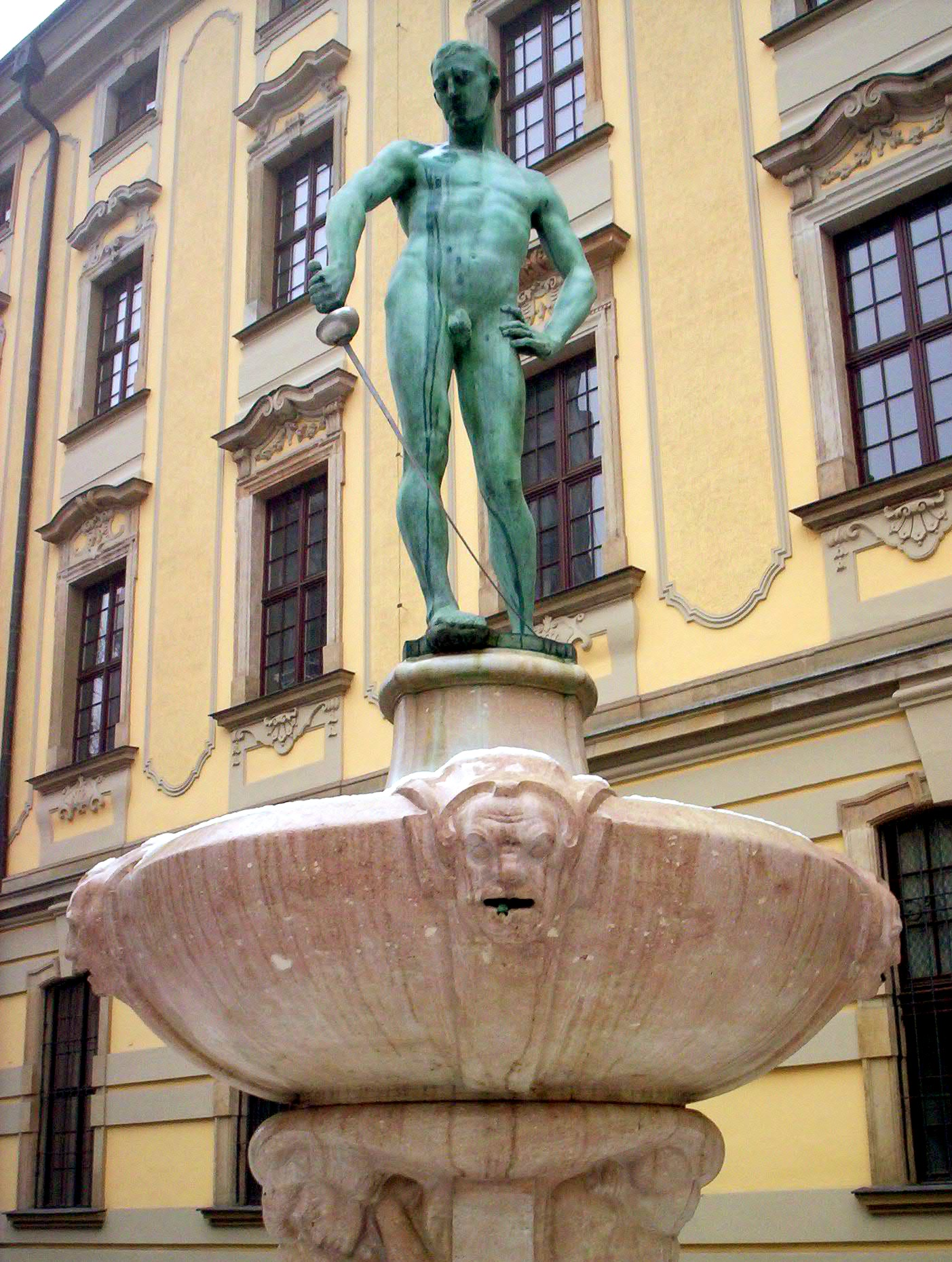 Fontanna z sylwetką szermierza przed budynkiem Uniwersytetu Wrocławskiego